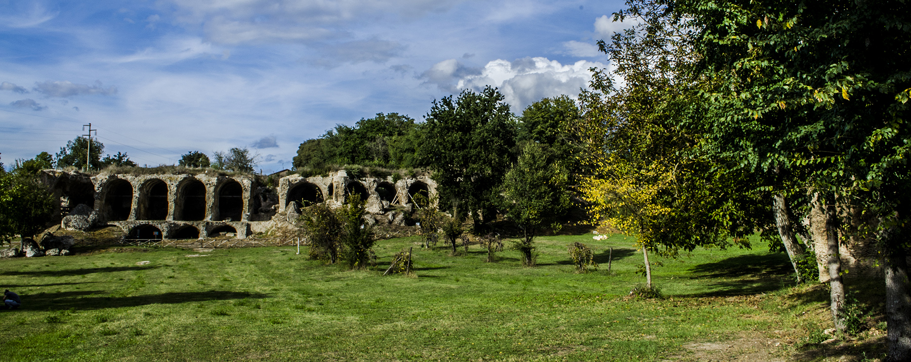 Ocriculum